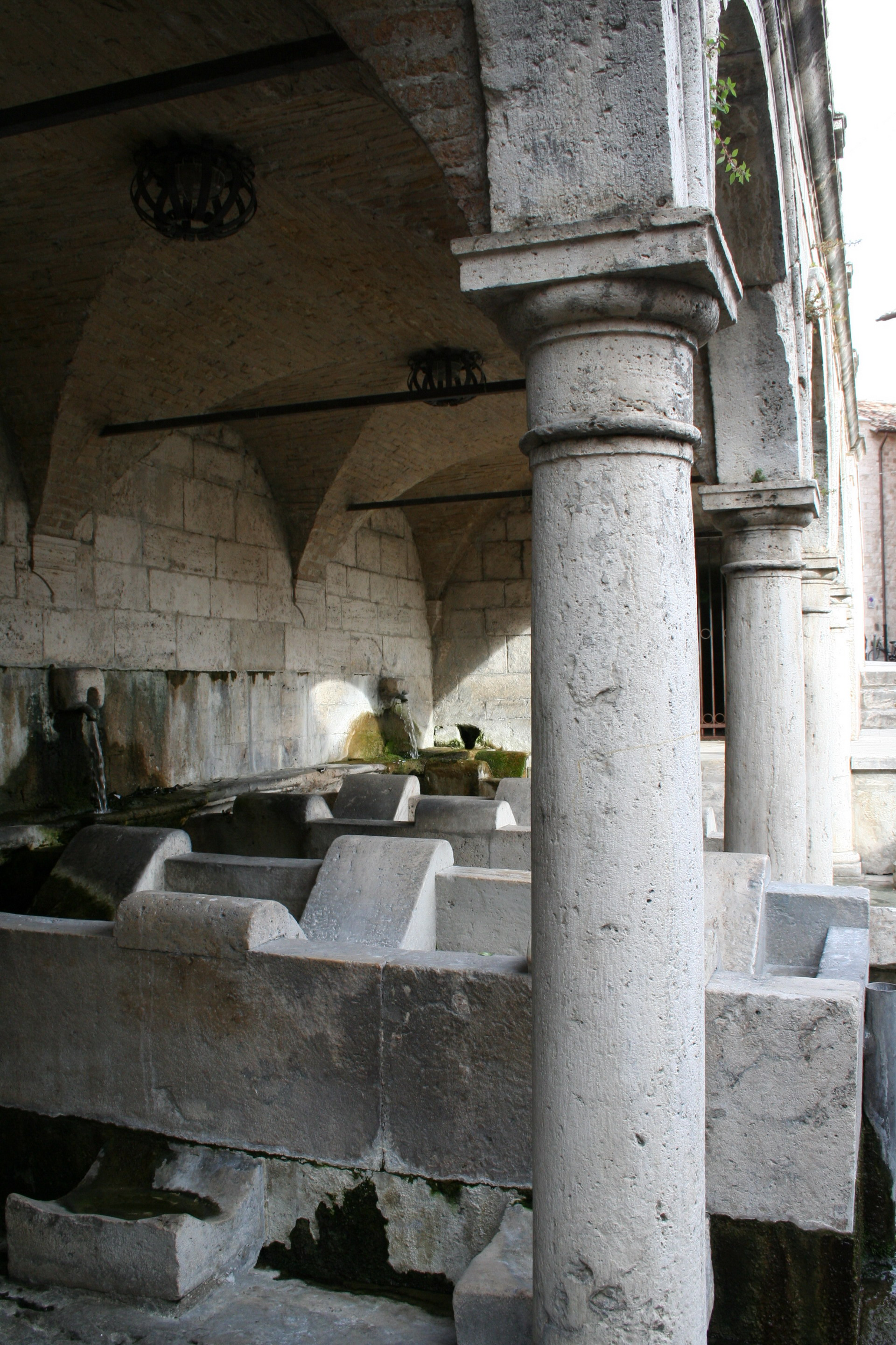 Lavatoio pubblico di Ascoli Piceno, esterno giorno, proprio scatto Sibilla.io "Utilizzo concesso" Ticket#2007040410014627 (ticket per le immagini) This file is licensed under Creative Commons 3.0 license